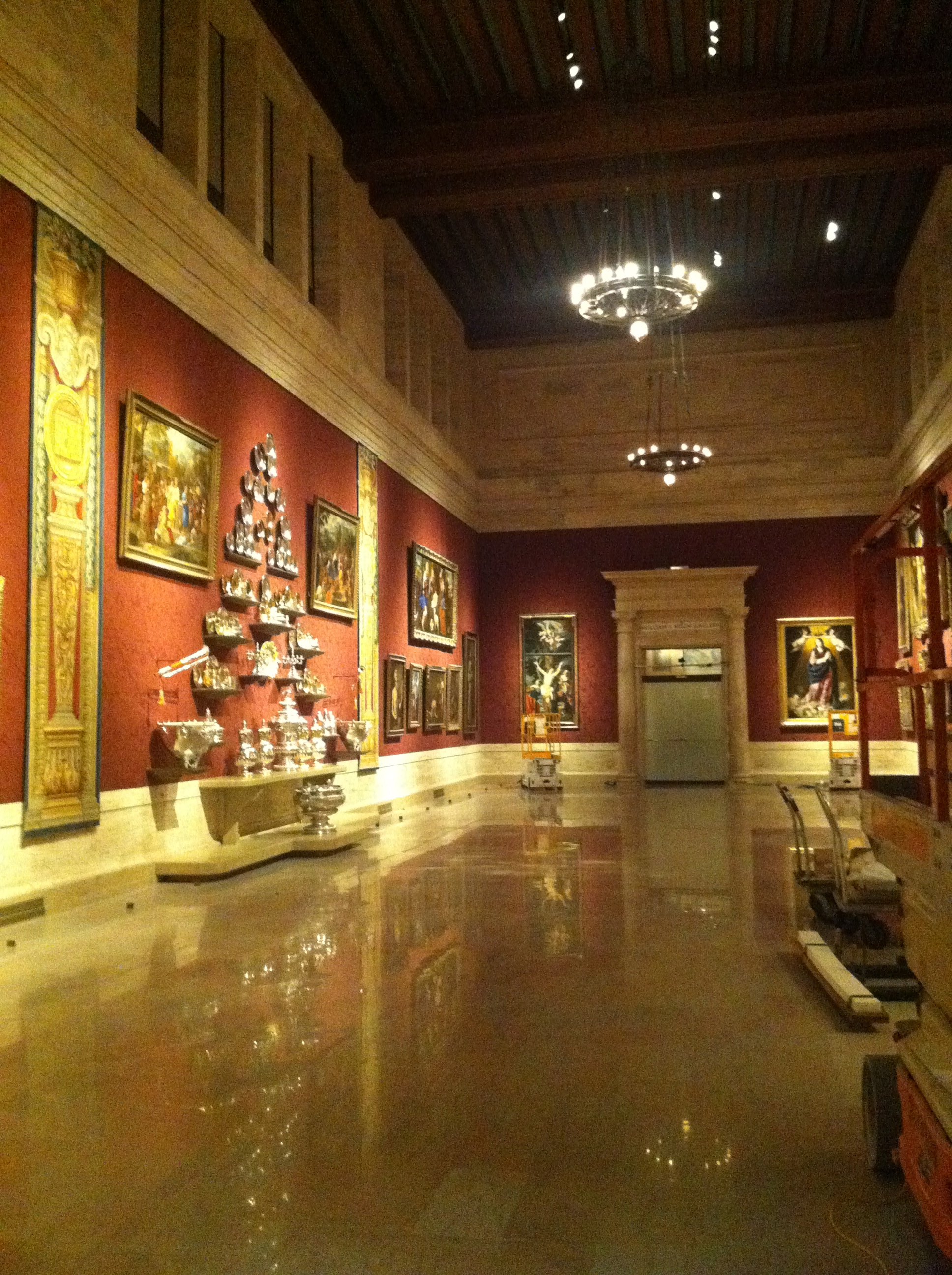 Boston, Museum of Fine Arts, salle espagnole